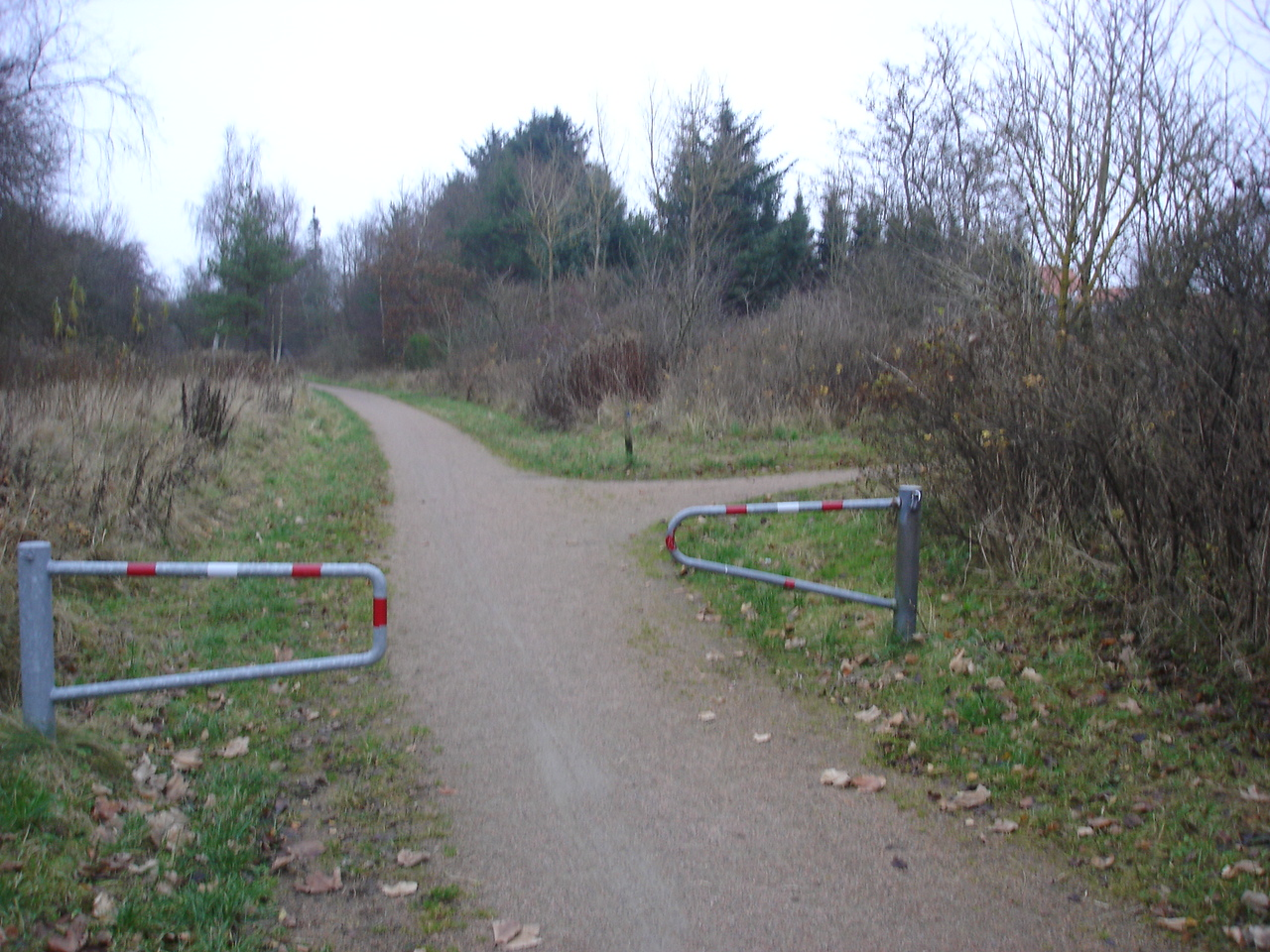 Salling Natursti passerer Søndre Dås - her lå det ny Skive Nord trinbræt, hvor Vestsallingbanen grenede fra